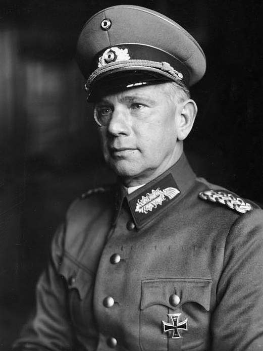 Walter v. Reichenau ADN-ZB/Archiv Walter von Reichenau, Generalfeldmarschall der faschistischen deutschen Wehrmacht (seit 1940), geboren: 8.10.1884 in Karlsruhe gestorben: 17.1.1942 in der Sowjetunion. Unser Bild zeigt ihn als Generalmajor und Chef des Wehrmachtsamts im Reichsministerium. (Aufnahme: 1933) [Generalmajor Walter von Reichenau (Porträt)] Abgebildete Personen: Reichenau, Walter von: Generalfeldmarschall, Ritterkreuz (RK), Heer, Chef des Wehrmachtsamtes, Deutschland (GND 123390699)